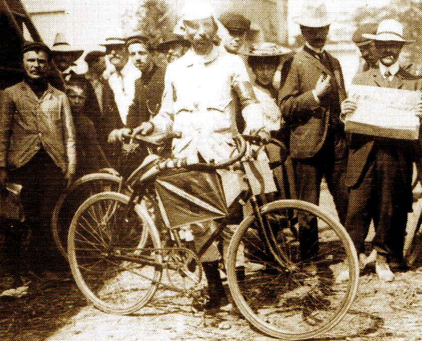 Tour de France 1903, Marcel Kerff.